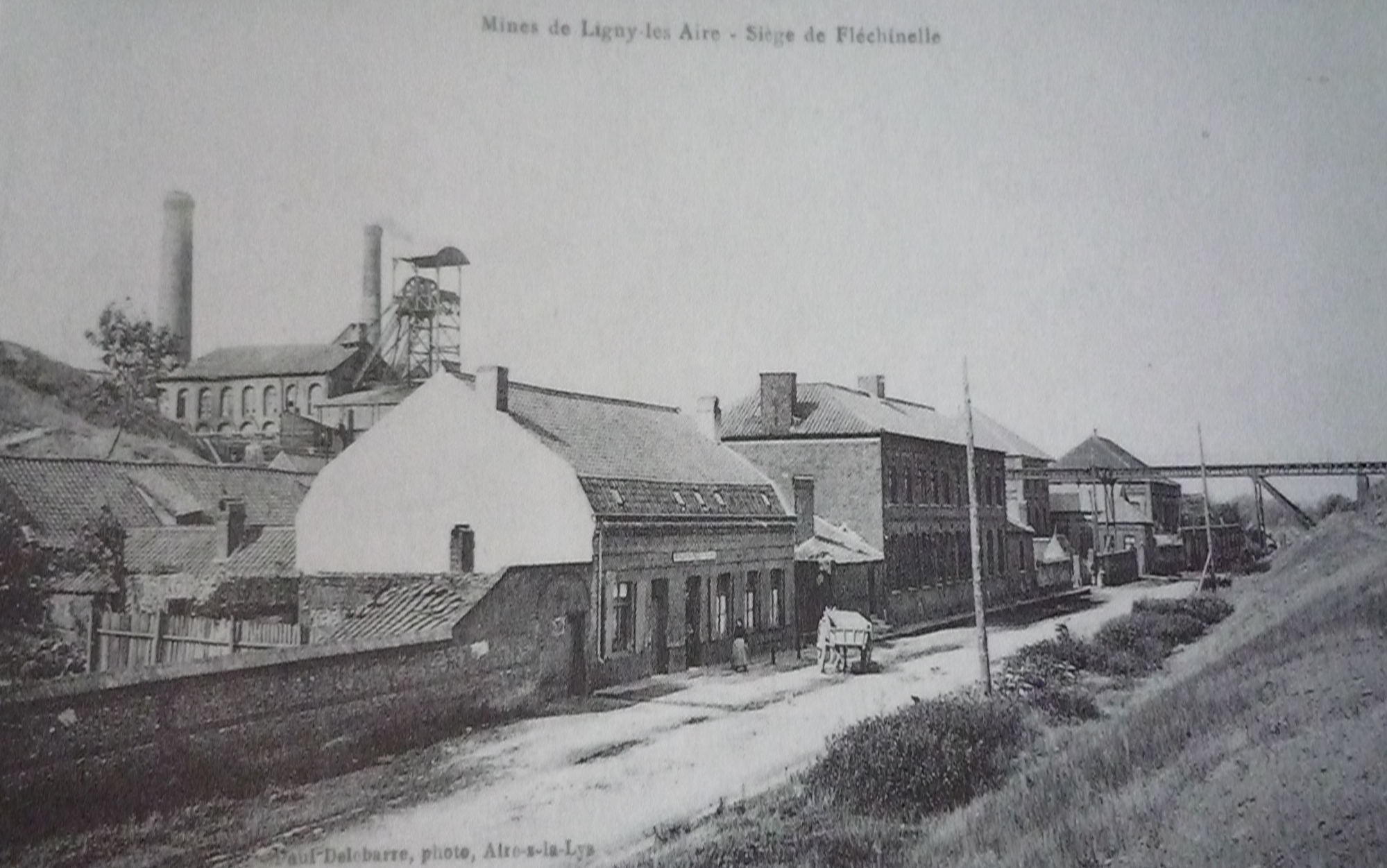 La Fosse de Fléchinelle de la Compagnie des mines de la Lys-Supérieure, devenue la Fosse n° 1 - 1 bis de la Compagnie des mines de Ligny-lès-Aire était un charbonnage constitué de deux puits situé à Enquin-les-Mines, Pas-de-Calais, Nord-Pas-de-Calais, France.